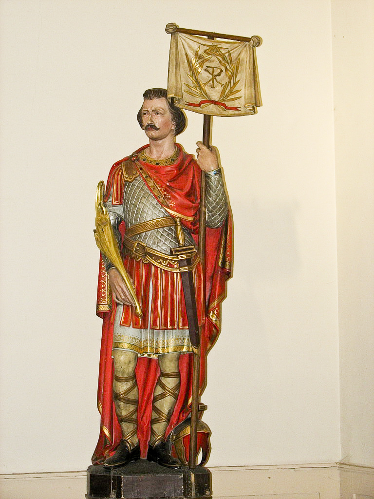 Statue de saint Julien. Ath